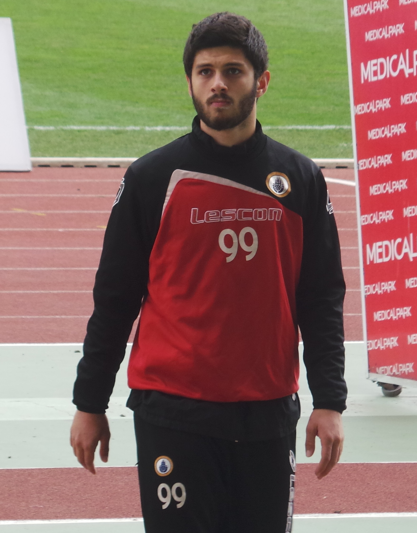 İbrahim Yılmaz